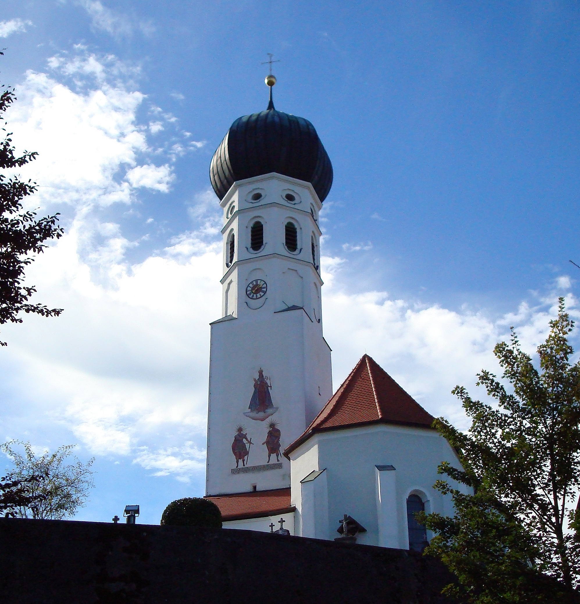 Münsing, Pfarrkirche Mariä Himmelfahrt. Barocker Saalbau mit eingezogenem Chor und südlichem Zwiebelturm, Chor im Kern spätgotisch, Turmoberbau und Barockisierung um 1640/50, Umgestaltung um 1765/70, westliche Erweiterung um 1919; mit Ausstattung. This is a photograph of an architectural monument.